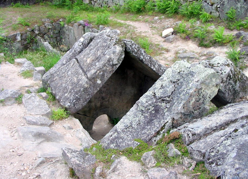 Citania de Briteiros, Portugal. Balneario suroeste